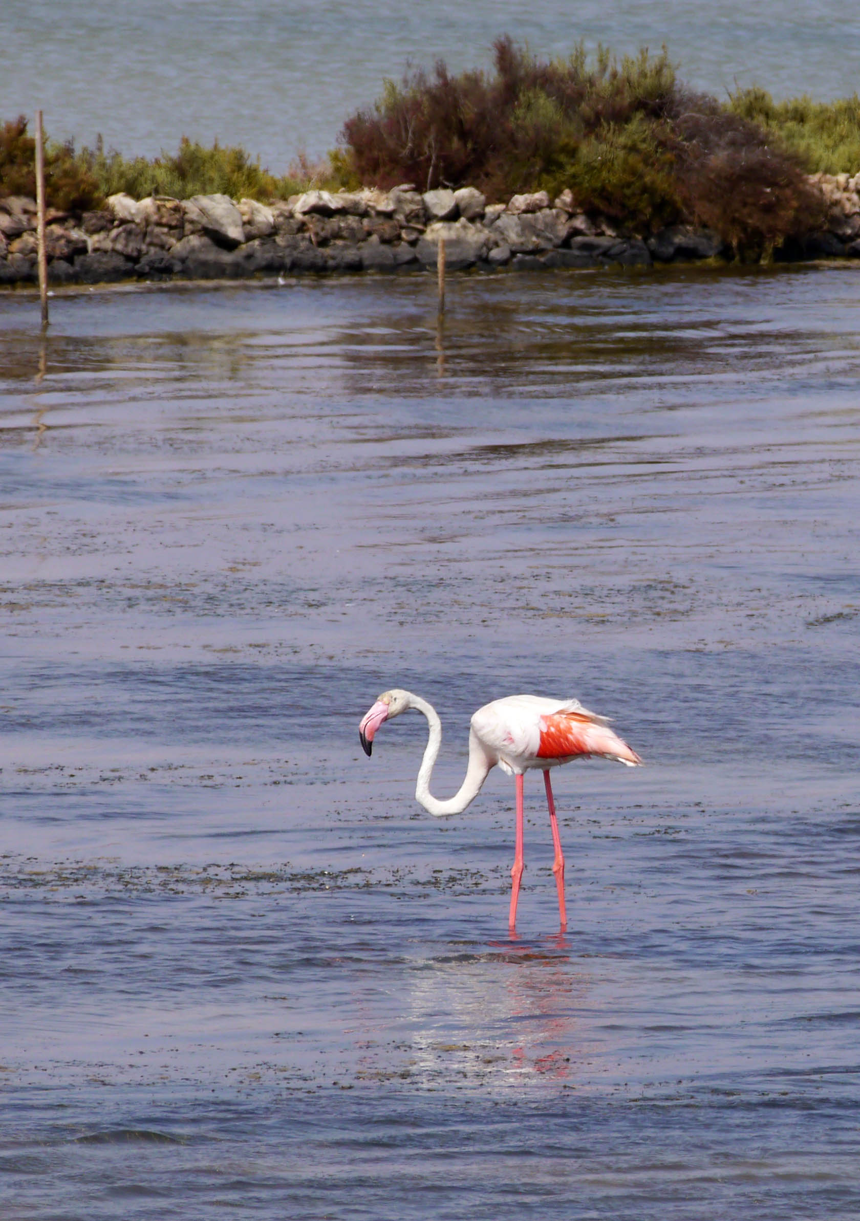 Flamenco (Phoenicopterus roseus) en las salinas de Marchamalo, La Manga del Mar Menor, España.